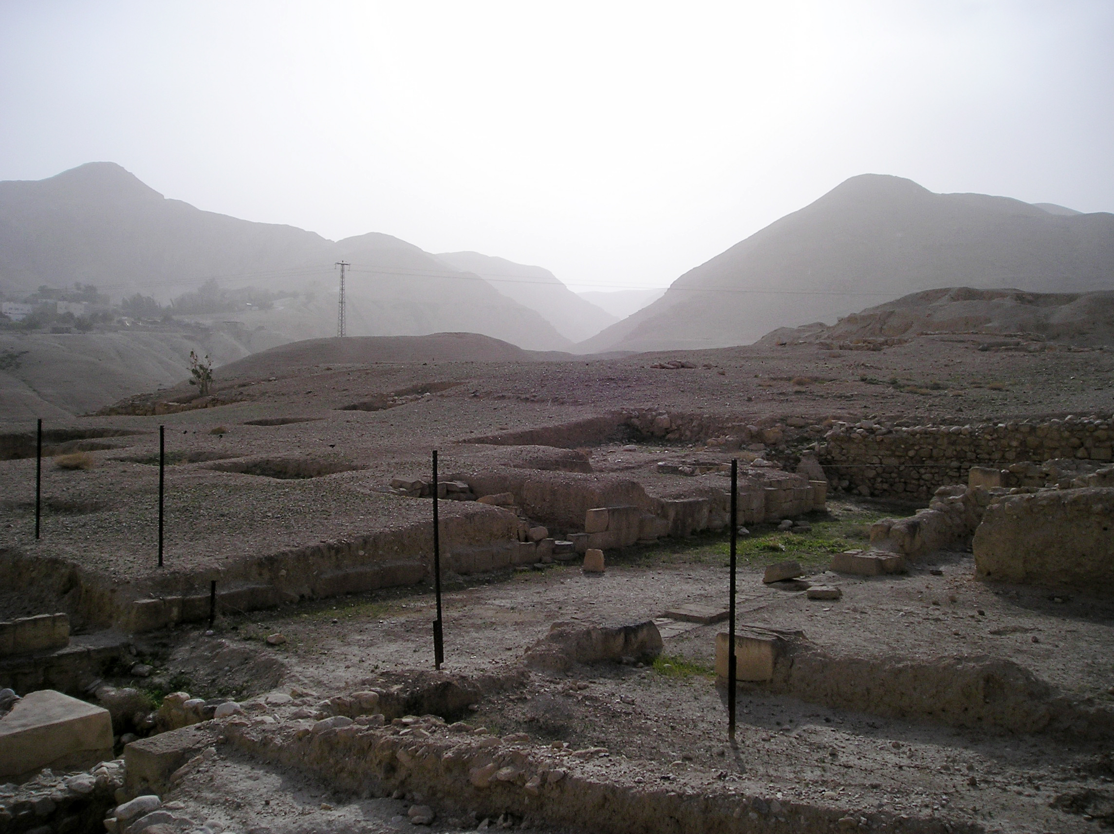 Widok z Jerycha herodiańskiego (Autonomia Palestyńska) na Kypros (Bait Dżaber at-Tahtani) i Wadi Qelt. Zdjęcie wykonał A. Sobkowski dn. 9 marca 2006.